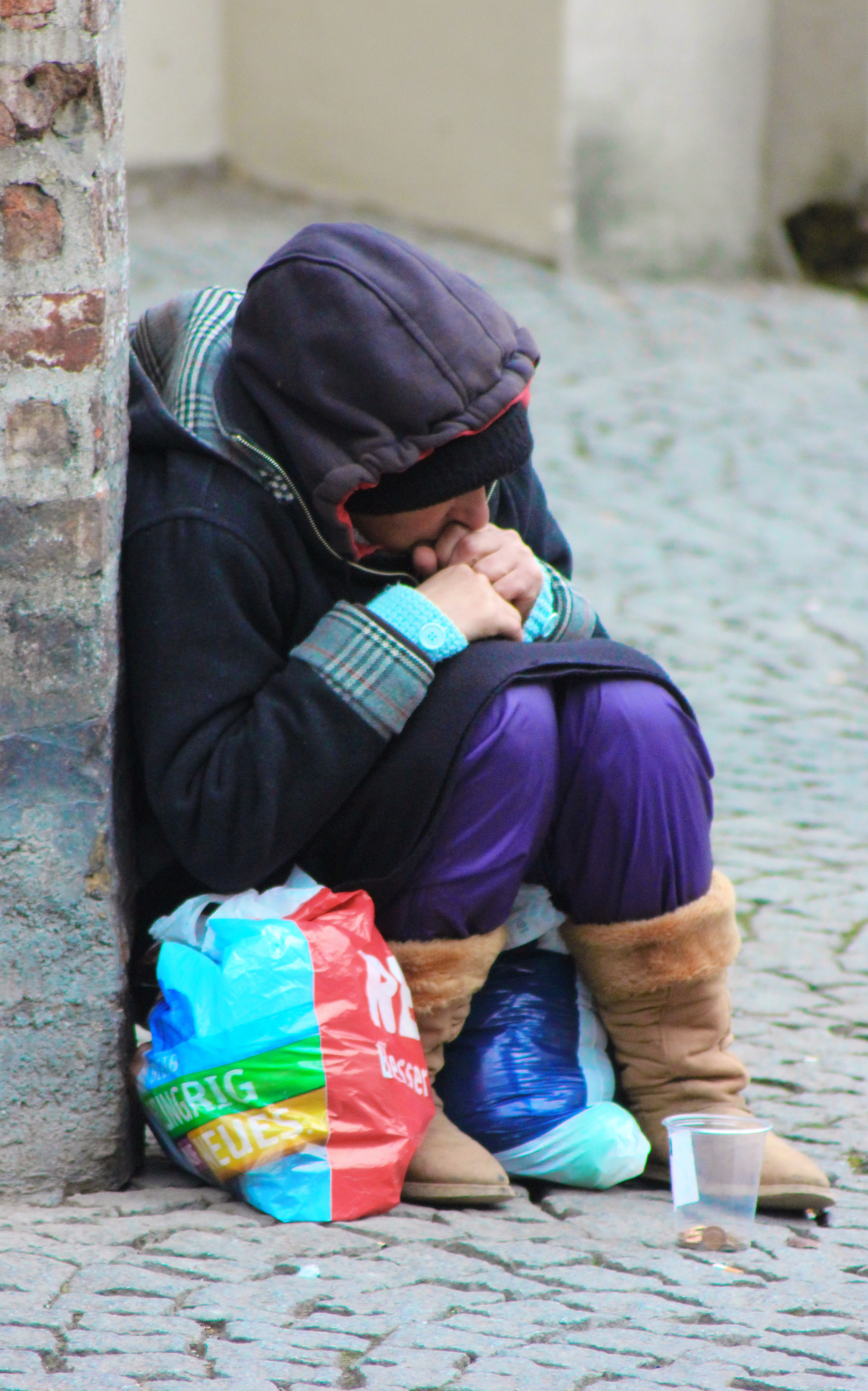 Bettlerin am Sendlinger Tor Platz in München